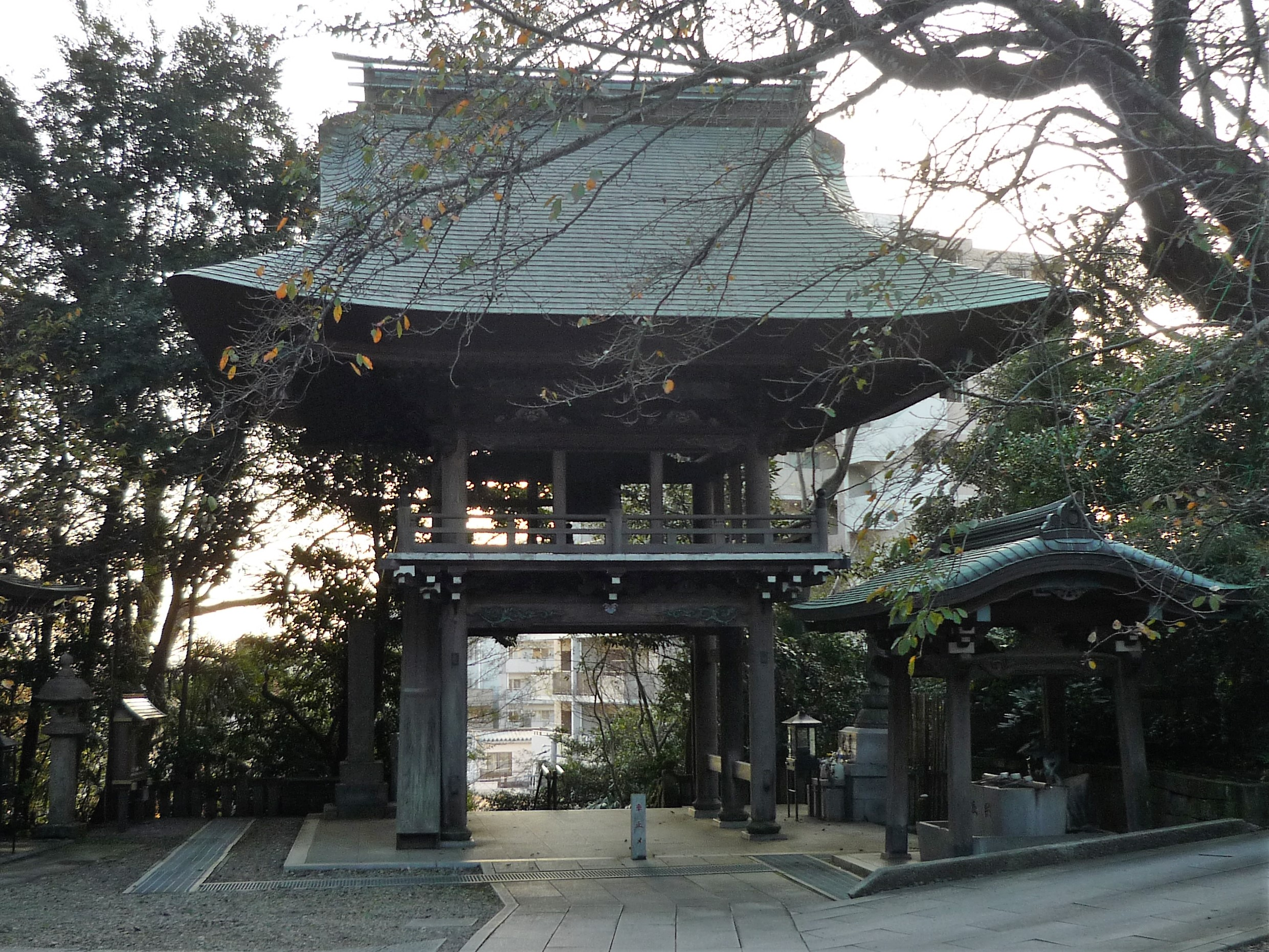 長禅寺（取手市取手）山門 Panasonic Lumix DMC-FS3